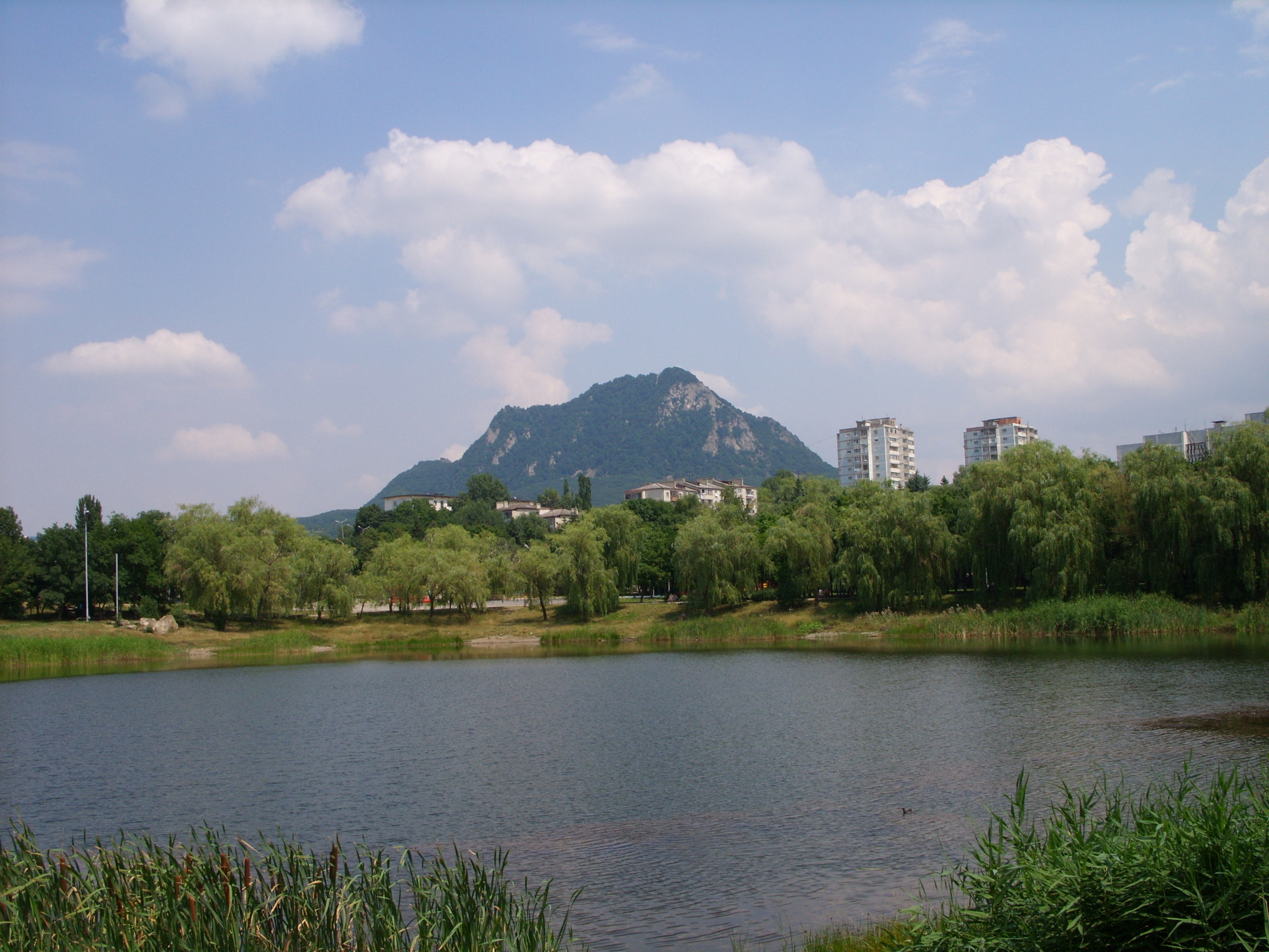 снимок июля 2009 г.